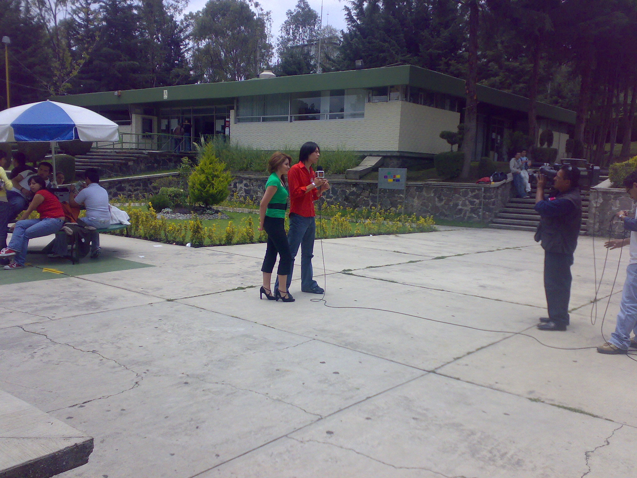 Facultad de Ciencias Políticas y Administración Pública